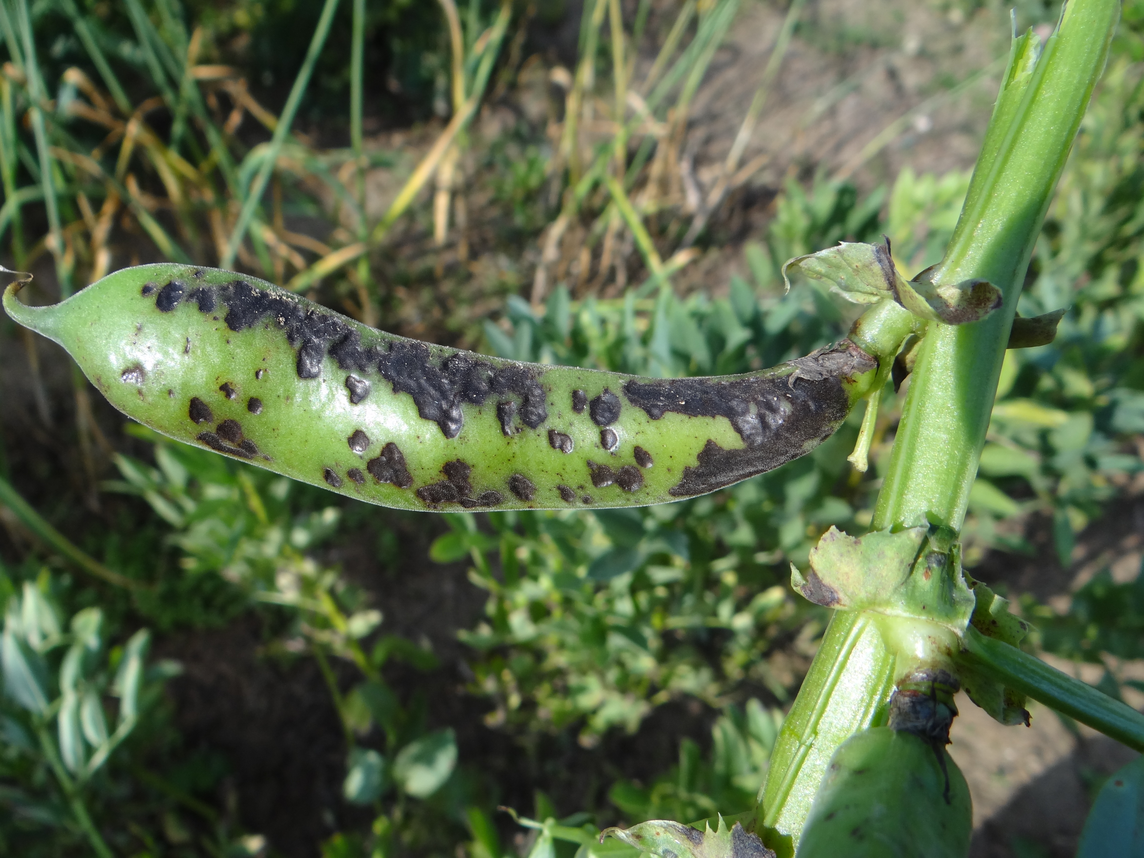 Didymella fabae on Vicia faba